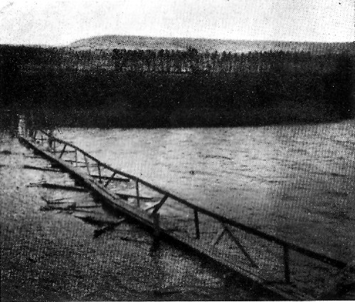 Brückensteg über die Marne